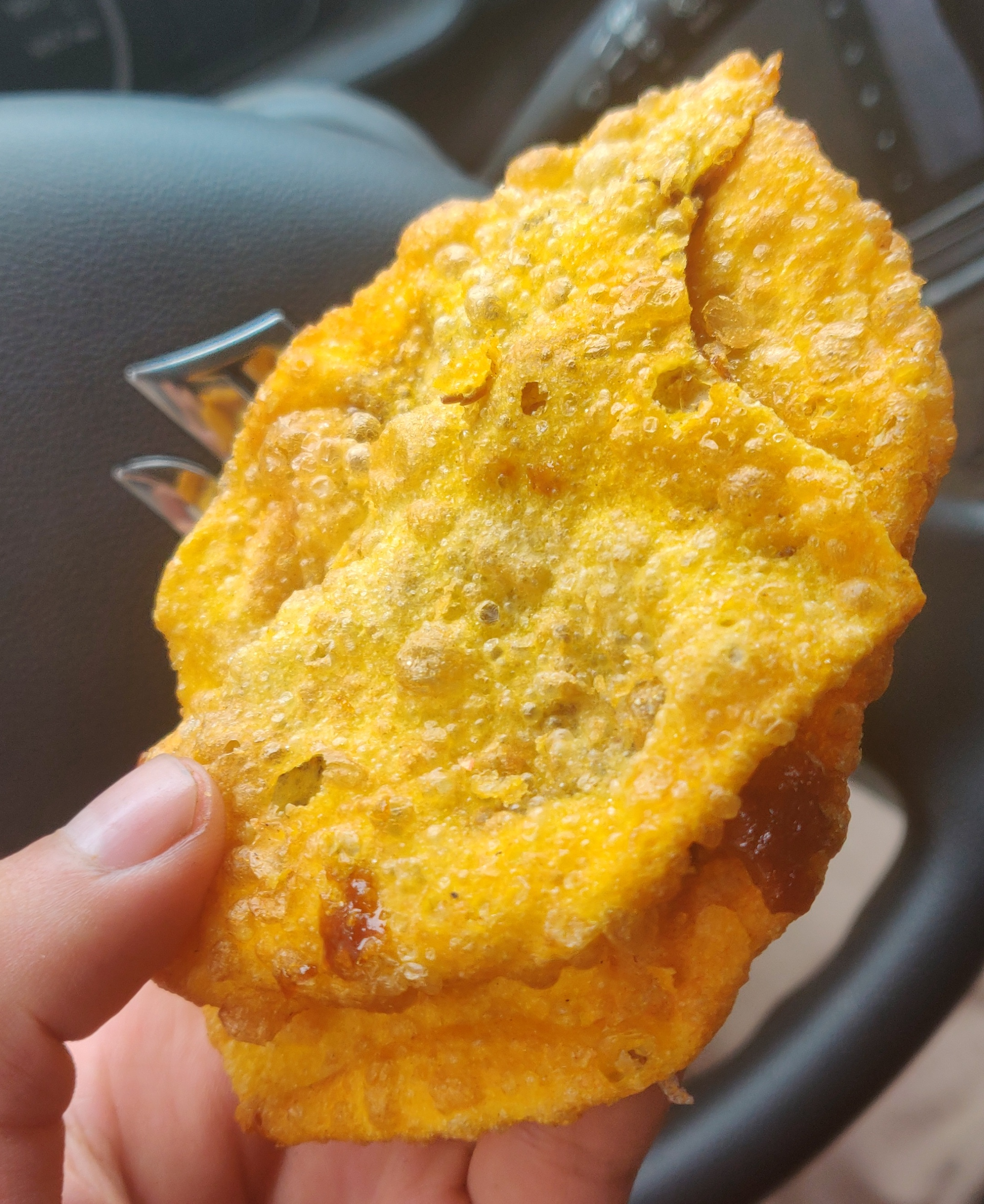 Alfajor cajamarquino, comprado en la ciudad del mismo nombre; a un precio de 4 por S/ 1.